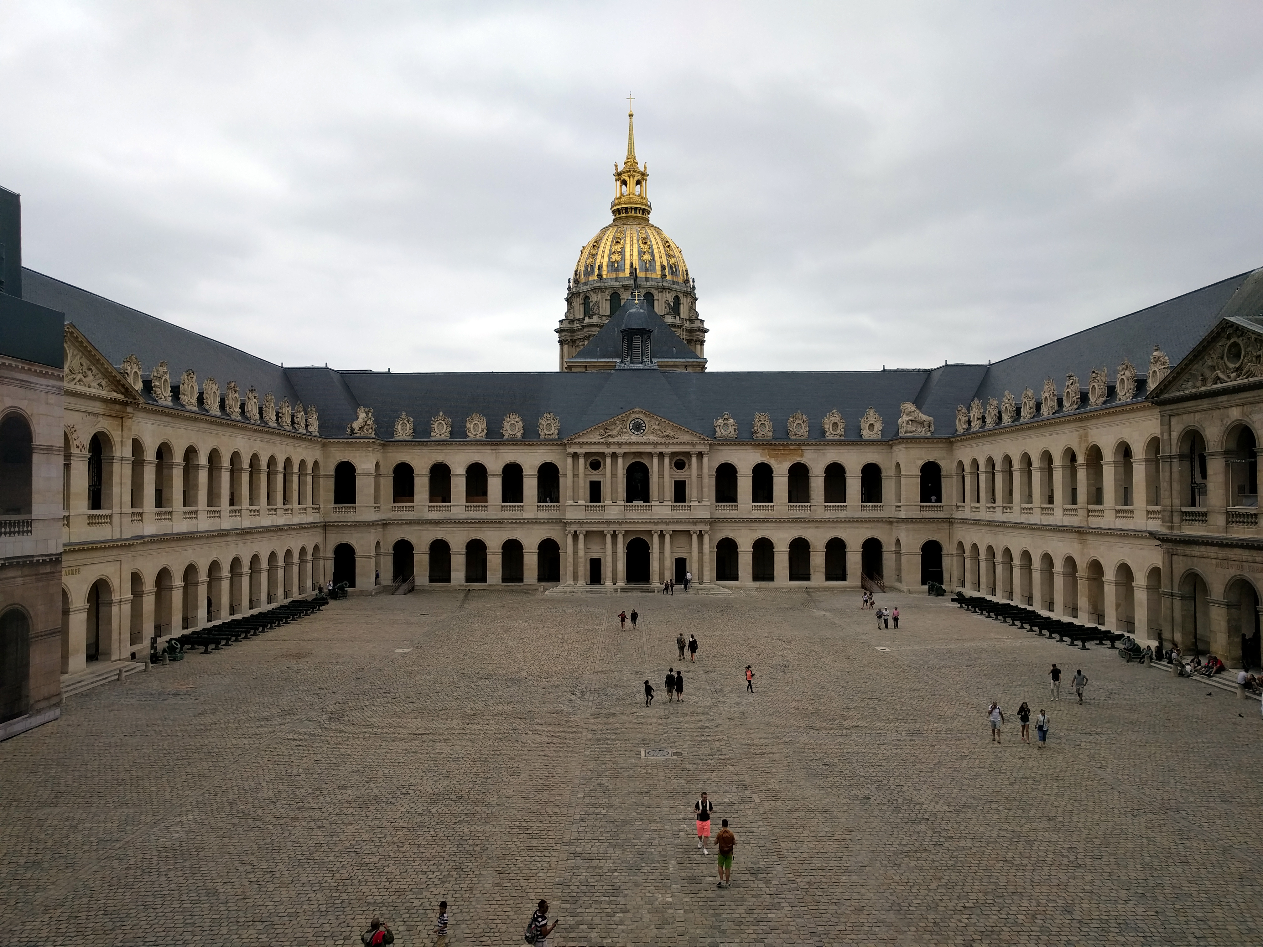 Patio del palacio de Los Inválidos, París